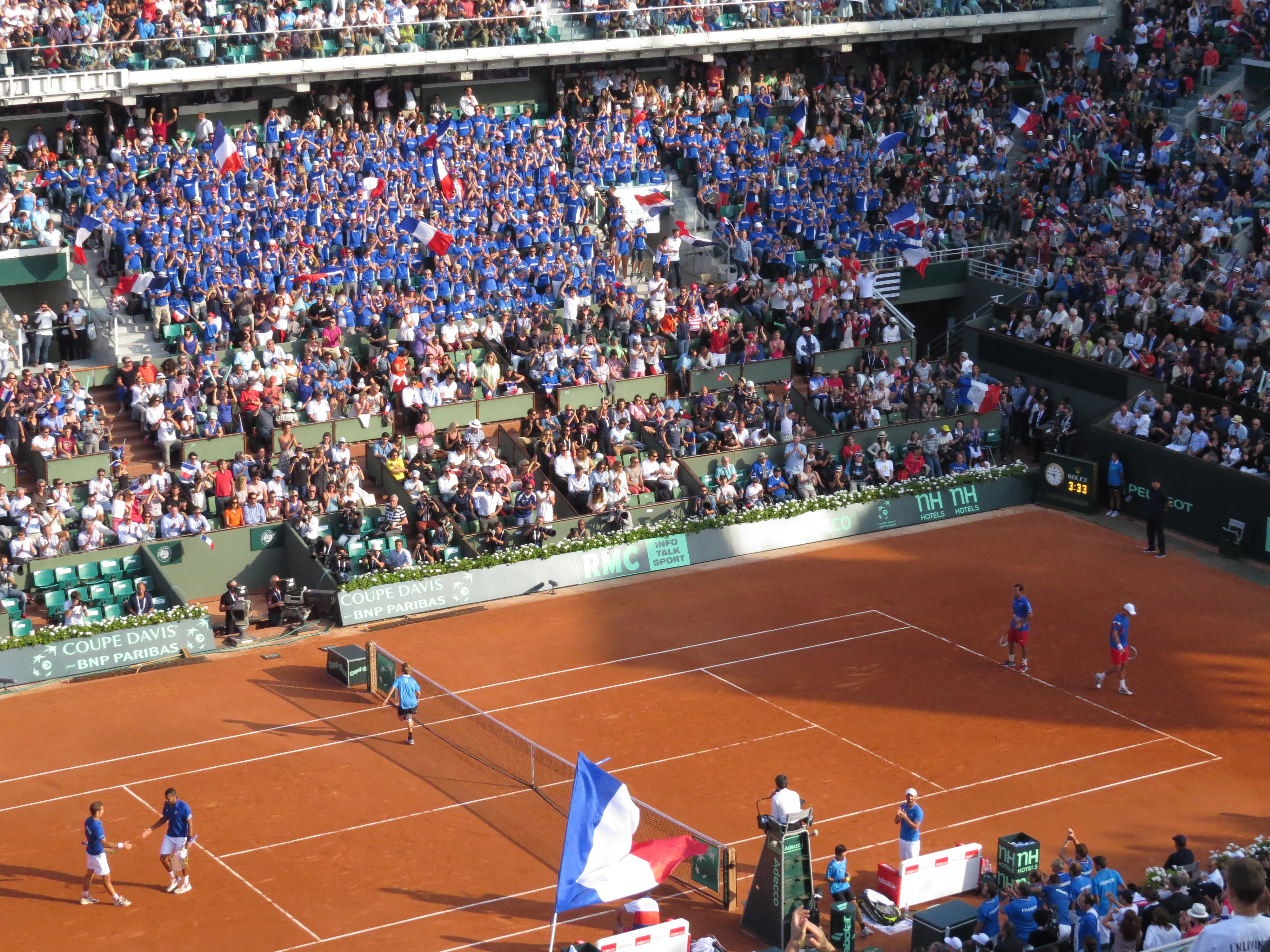 Demi-finale entre la France et la République tchèque Double Victoire de la France